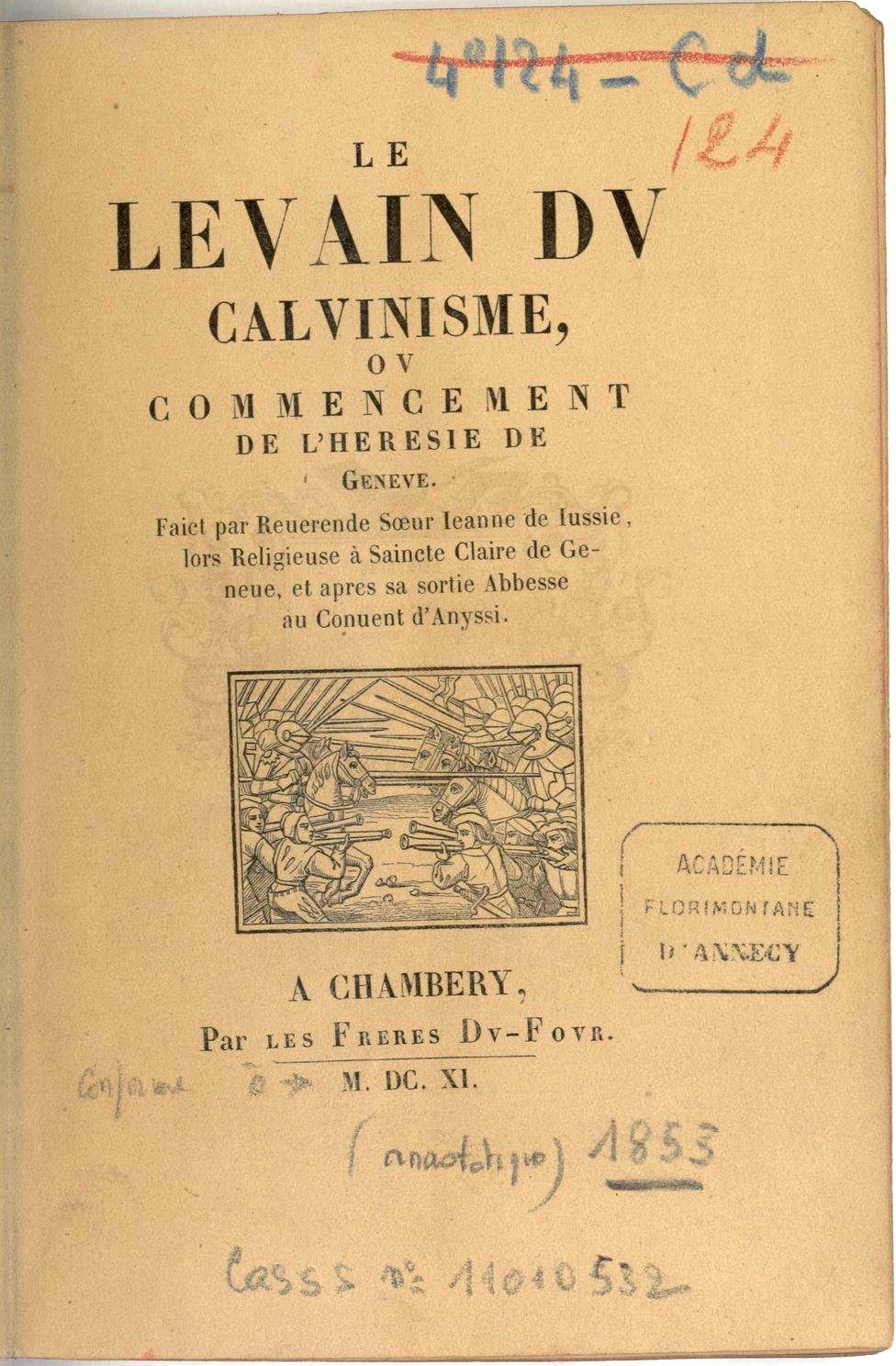 Le levain du calvinisme ... de Jeanne de Jussie (1503-1561). Éditions de 1853 par J.-G. Fick (Genève).